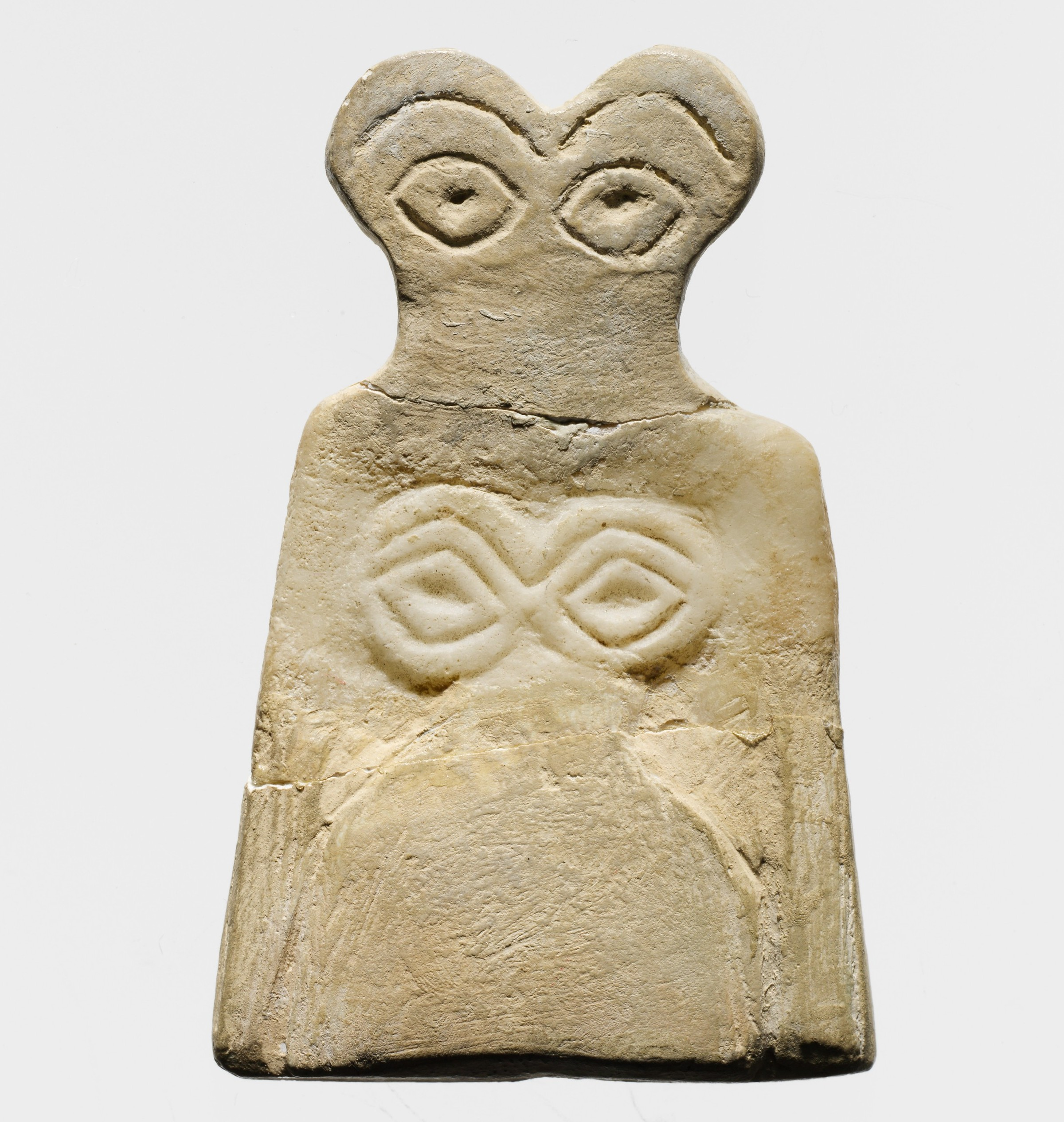 Sculpture; Stone-Sculpture